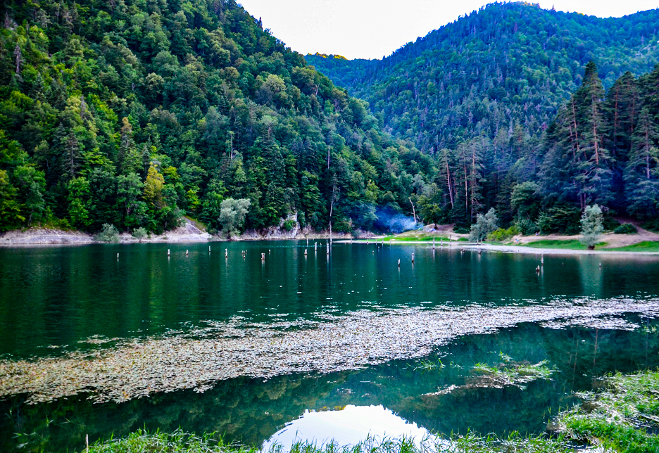 Sülüklü Göl içindeki çam ağaçları